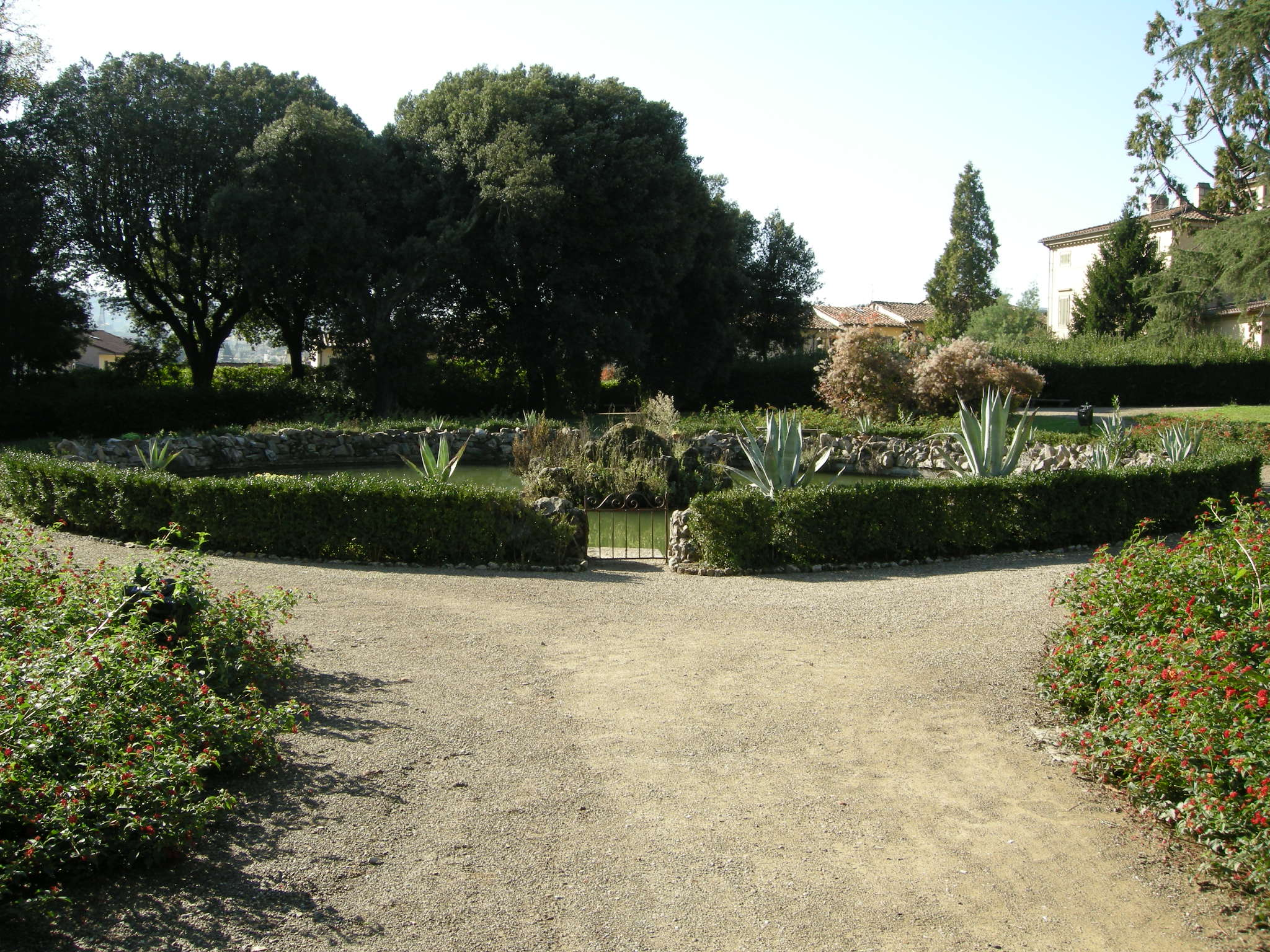 Villa di poggio a caiano, giardino all'italiana